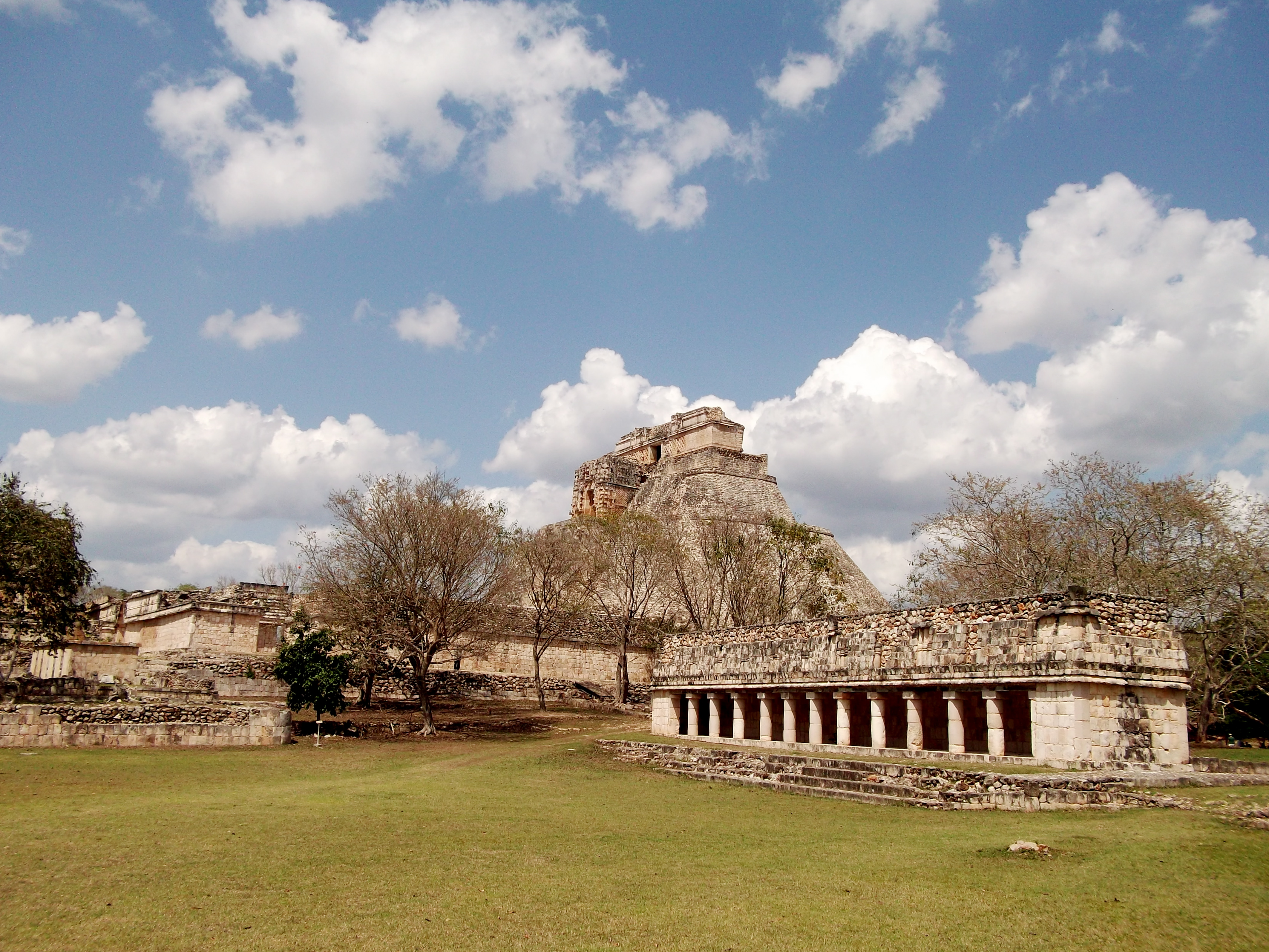 Ciudad Maya de Uxmal en Yucatán